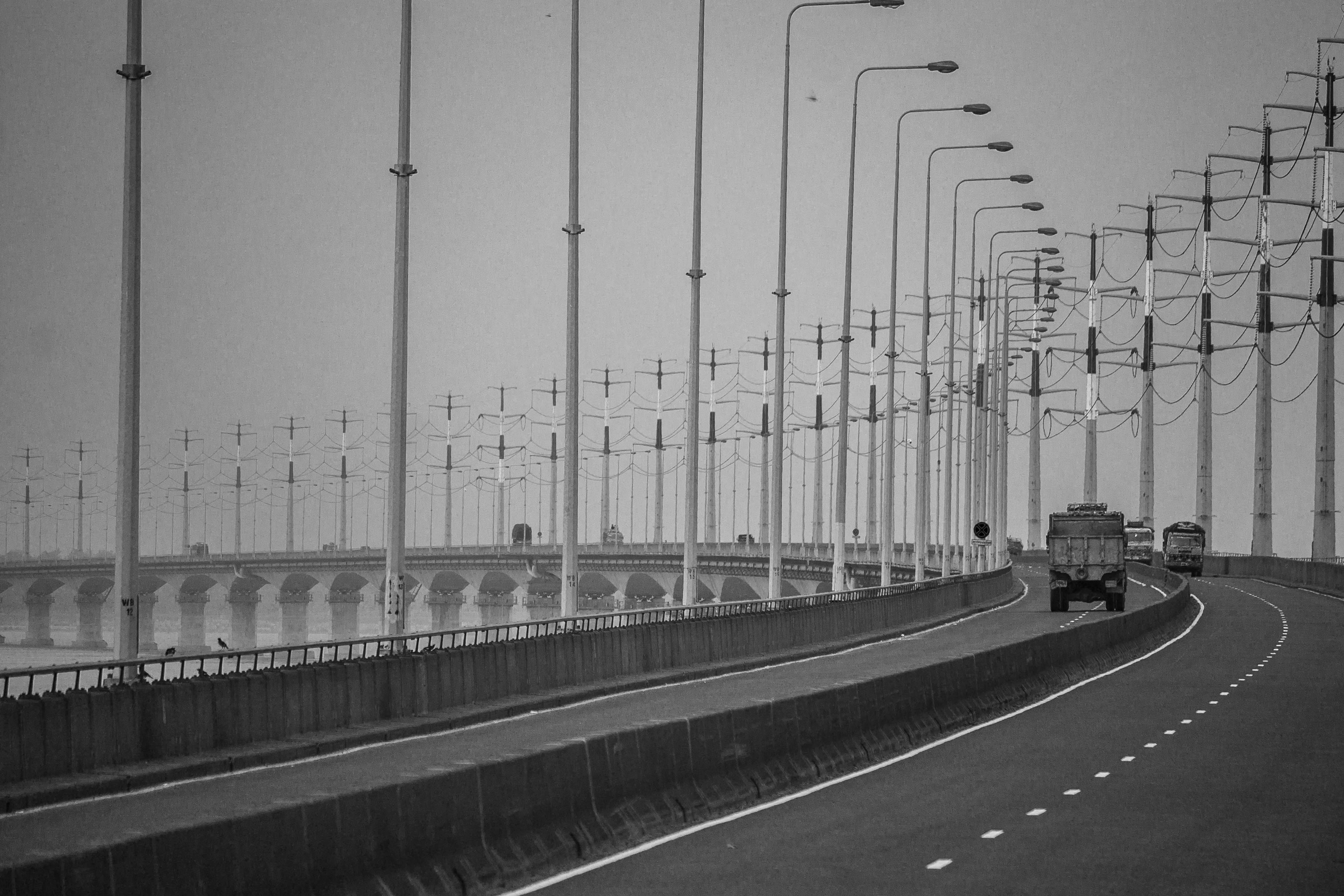 বঙ্গবন্ধু সেতু